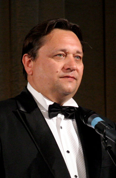 Актёр Малого театра Александр Клюквин